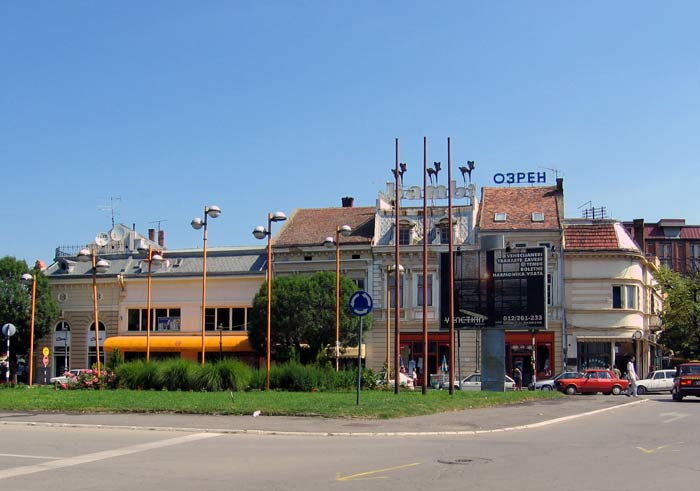 Centar Požarevca